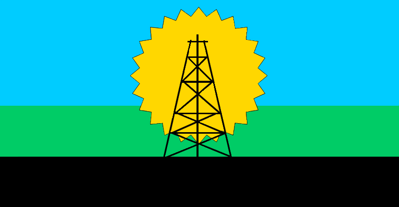 Bandera del Municipio Cabimas, Estado Zulia, Venezuela